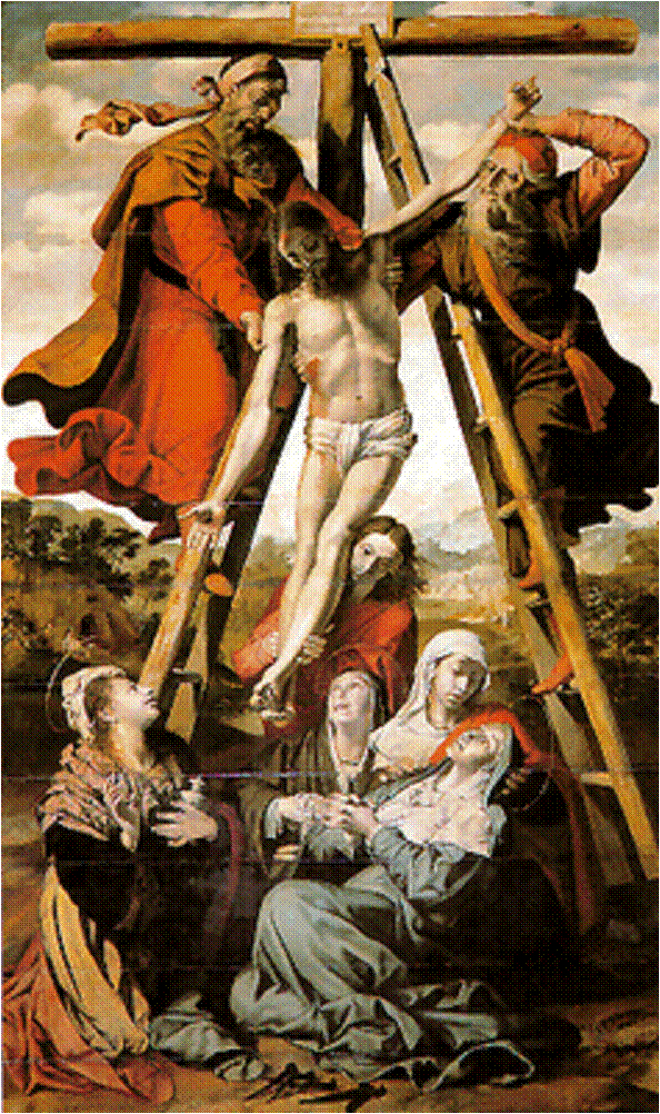 Esta obra, que se conserva en la Sacristía mayor de la catedral de Sevilla, (España), fue pintada en 1547 por Pedro de Campaña, y hasta 1814, en que entró a formar parte del tesoro catedralicio sevillano, estuvo en la desaparecida iglesia de Santa Cruz de Sevilla.